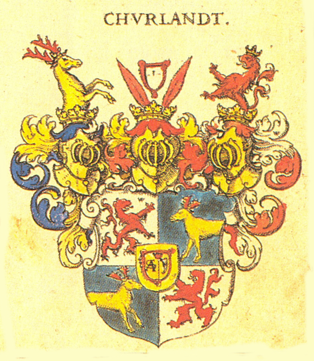 Wappen des Herzogtums Kurland